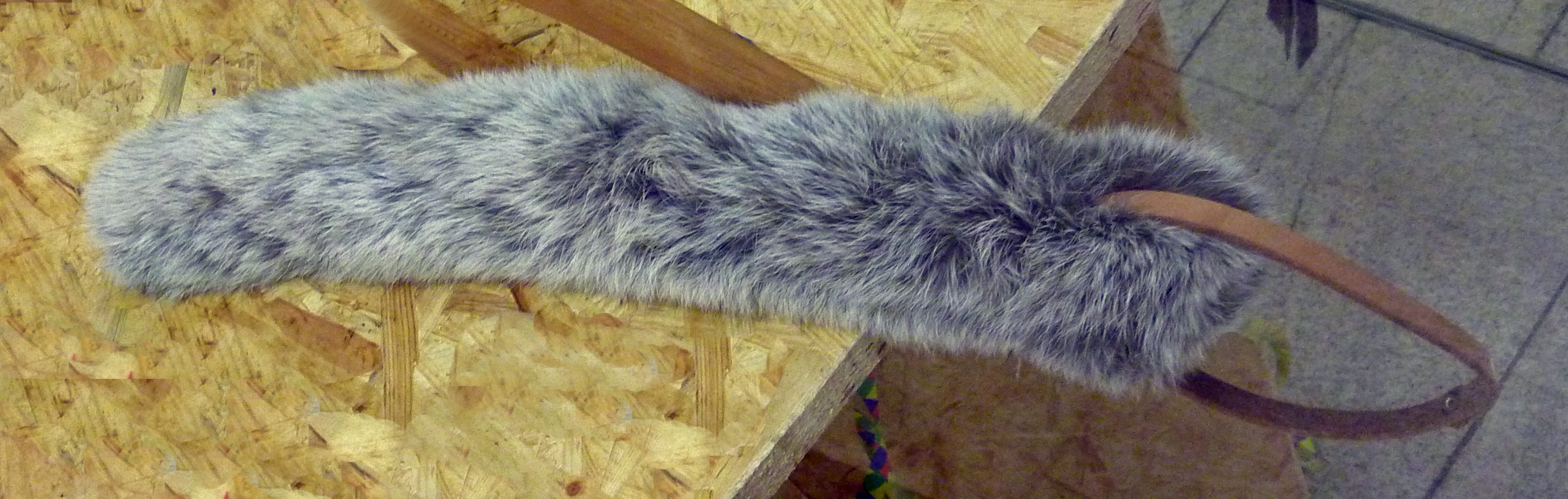 Katzenwadel - Häsrequisit oder Narrenutensil der Katzenzunft Hardt e.V. Exponat aus der Sammlung Peter Scharte aus der Ortenau, vom 14. Januar bis 13. Februar 2013 im Einkaufszentrum Schwarzwald City (Freiburg) unter dem Titel „Narrenrequisiten - vielfältig und kreativ“ ausgestellt.